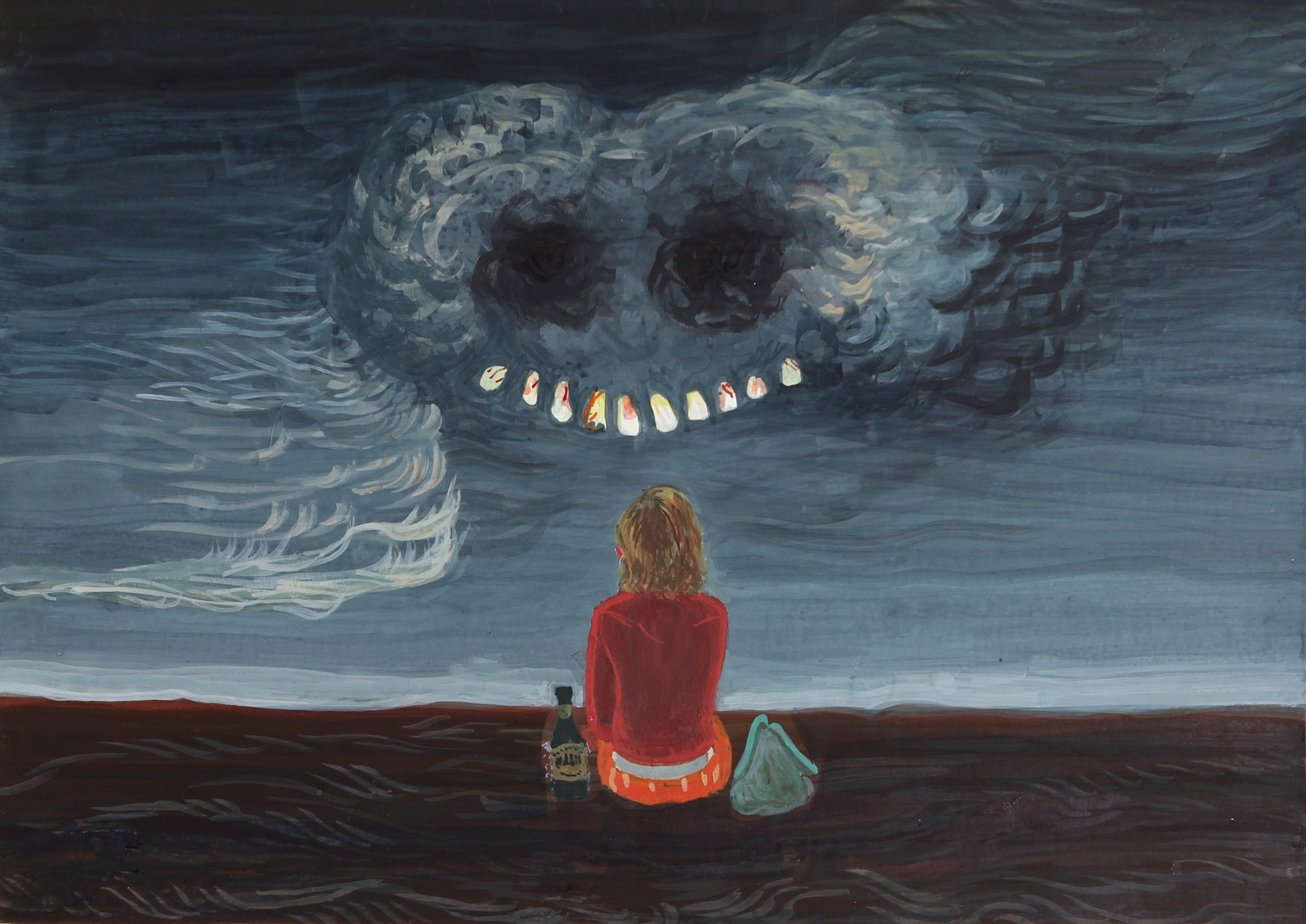 Aleksandra Waliszewska, malarka Apokalipsy, w swojej sztuce sięga do niewspółczesnych źródeł. W ostatnich latach artystka stale powraca do tematu opresji, tortur, seksualnego podporządkowania i zezwierzęcenia (w znaczeniu gatunkowych hybryd, jak i krwiożerczych zachowań). Ofiarami (rzadziej oprawczyniami) są kobiety, skazane na pastwę człekokształtnych bestii i sadystycznych mężczyzn. Monumentalne dzieło Waliszewskiej jest współczesnym moralitetem rozpisanym na kilka tysięcy rozdziałów, „przestrzegającym przed złem, zanim nadejdzie czas radości i słodyczy” (jak ironizowała sama artystka w rozmowie z Maurizio Cattelanem).